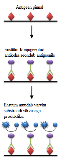 Otsene ELISA